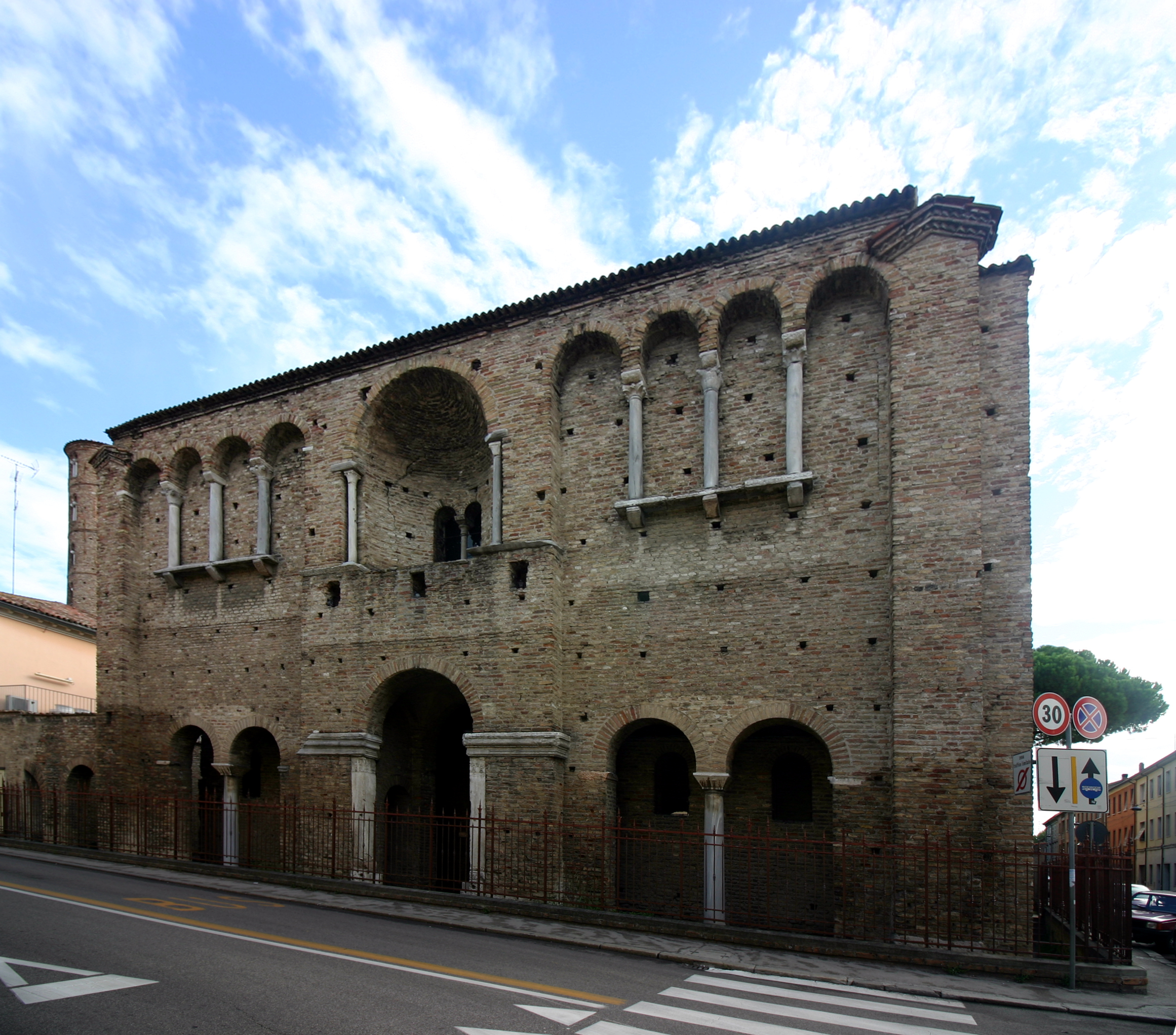 Palace of Theodoric - Ravenna